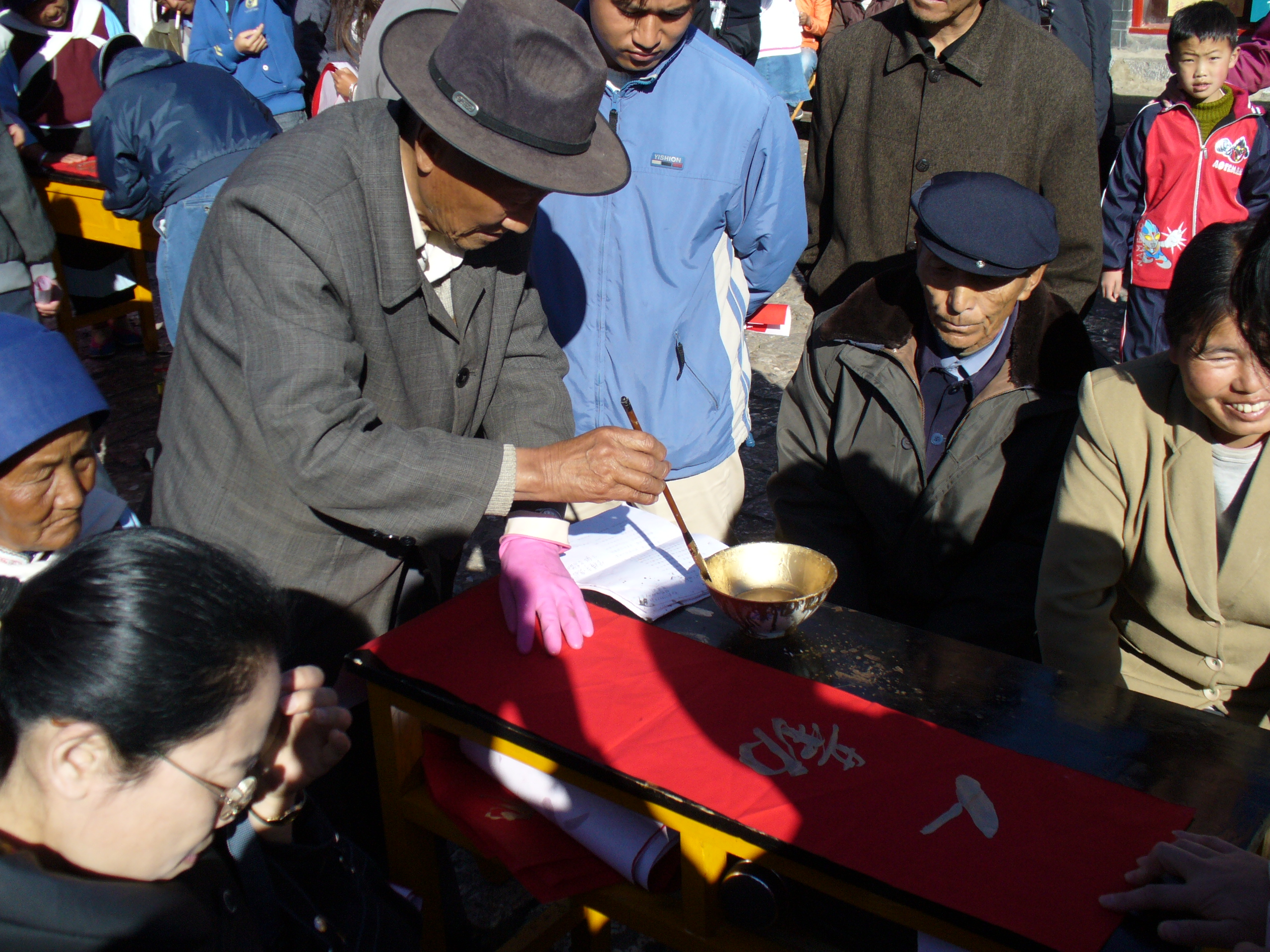 Schreiben eines Spruchbandes in Lijiang. 在丽江写的对联。